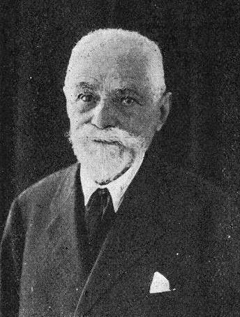 Manuel Insua Santos, fotografía en Vida Gallega 1934